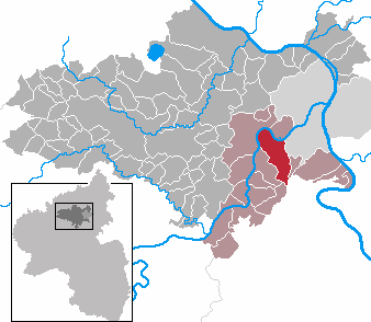 Dieblich in Rhineland-Palatinate - district Mayen-Koblenz